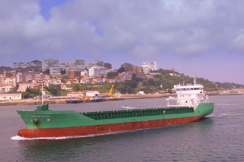 Un buque entrando en la Bahía de Santander (Cantabria, España).